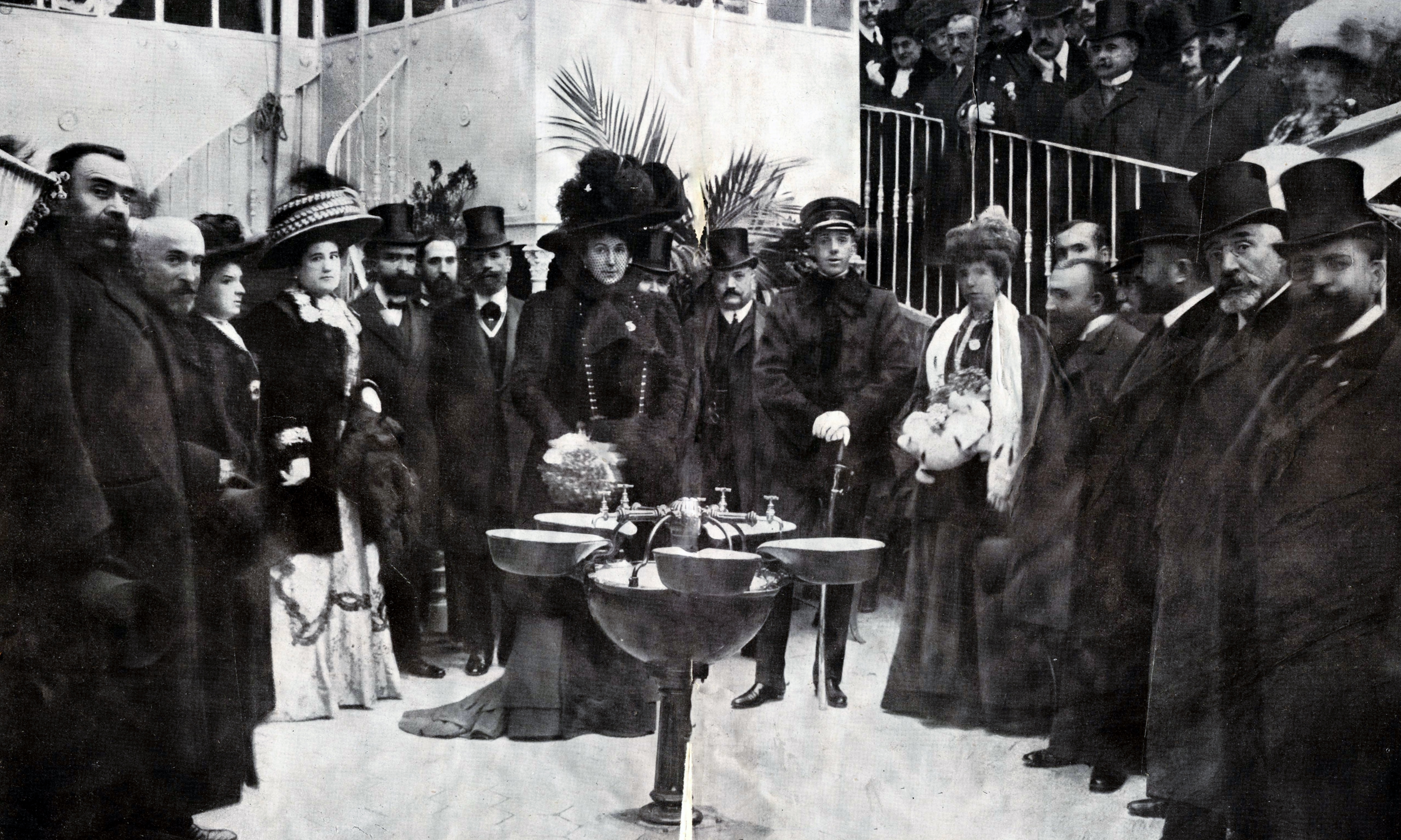 Sus Majestades el Rey Alfonso XIII y la Reina Victoria en el jardín del Dispensario Antituberculosos durante el acto de inauguración del mismo, denominado de "María Cristina", y sito en la calle Goya 40. Anteriormente habían inaugurado el de la calle Tutor, 38, llamado de "Victoria Eugenia". Actualidades, Madrid, Miércoles 30 de Diciembre de 1908.